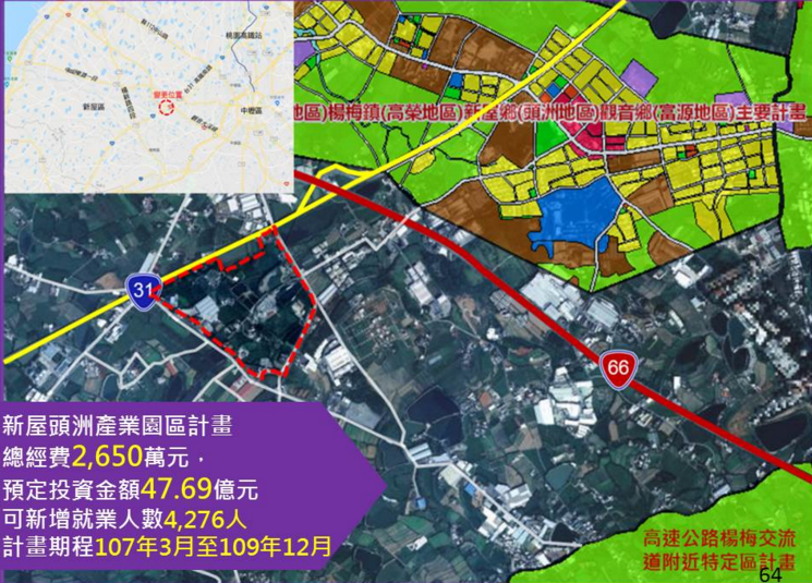 新屋頭洲產業園區位置圖